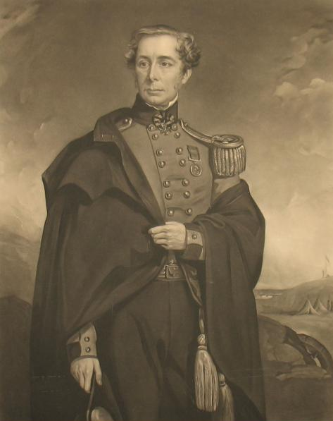 Литография Лорд Каткарт в Инкермане. 19 век.